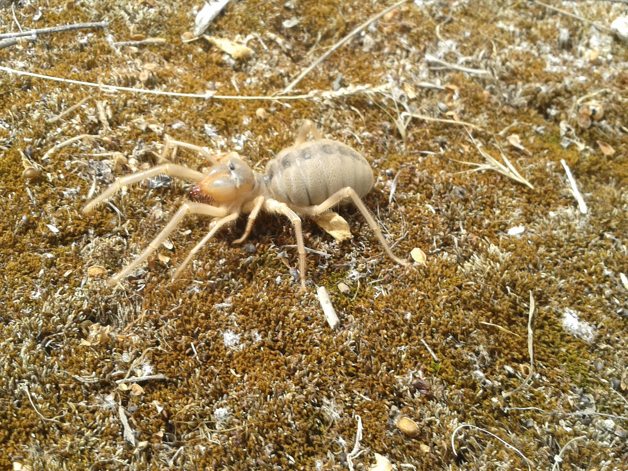 Сольпуга обыкновенная, 5 июля 2014 года